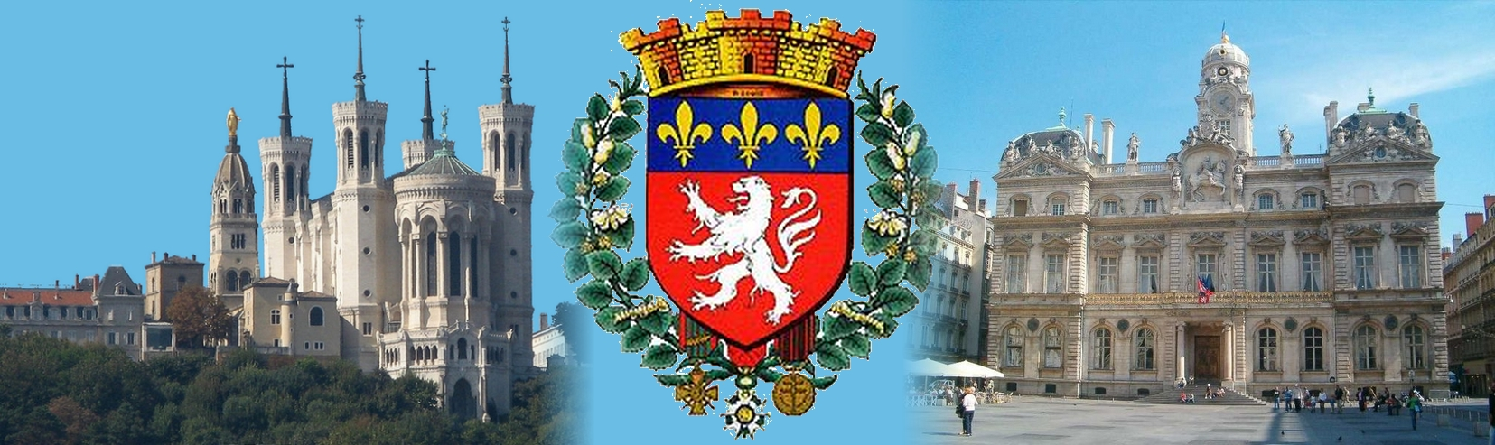 Basilique de Fourvière, coat of arms and the Hôtel de Ville de Lyon maquette 2 pour portail de Lyon